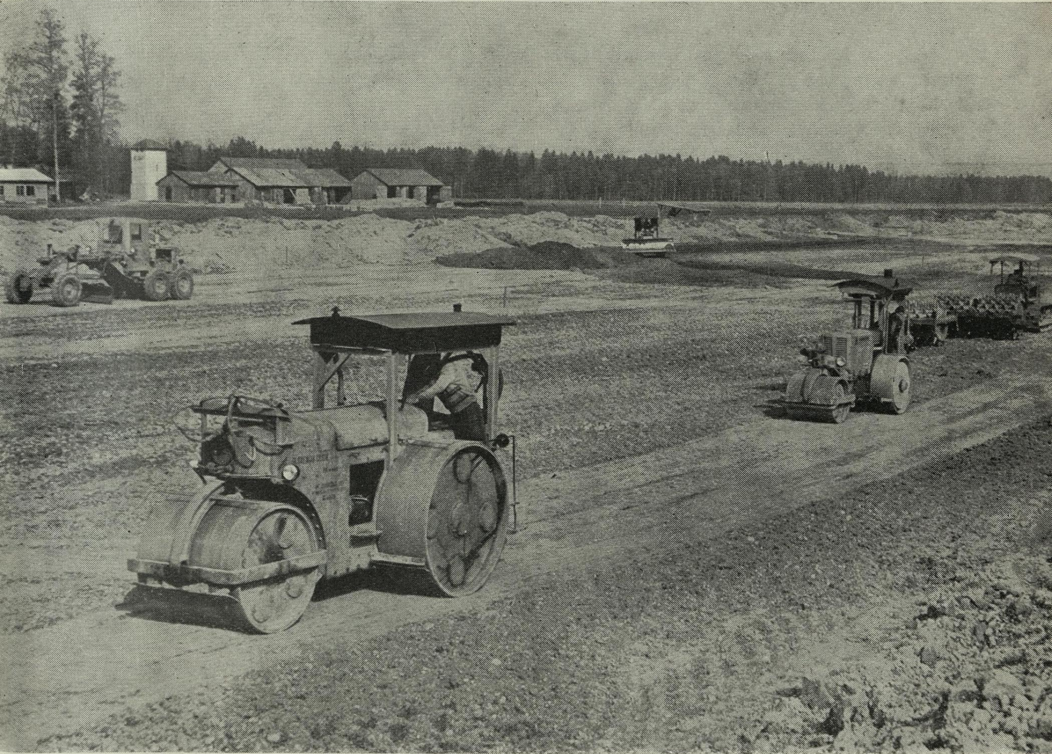 Letališče Brnik v gradnji; Gradbeni vestnik - 4 - 1963.